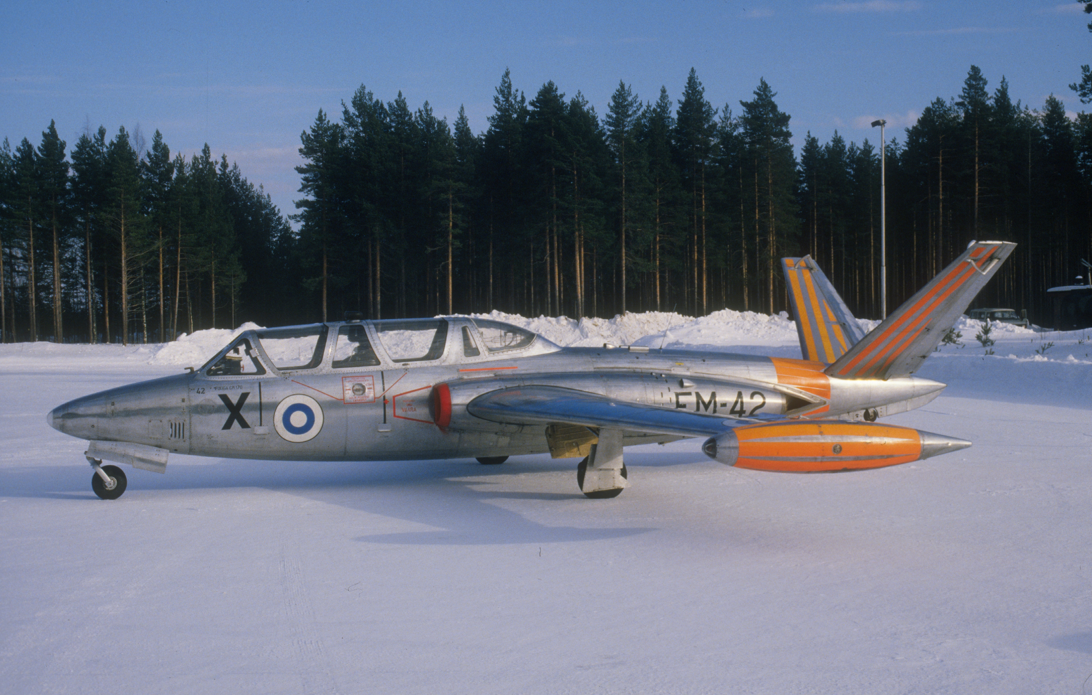 Suomen ilmavoimien suihkuharjoituskone Fouga CM-170 Magister FM-42 Kuorevedellä maaliskuussa 1987.